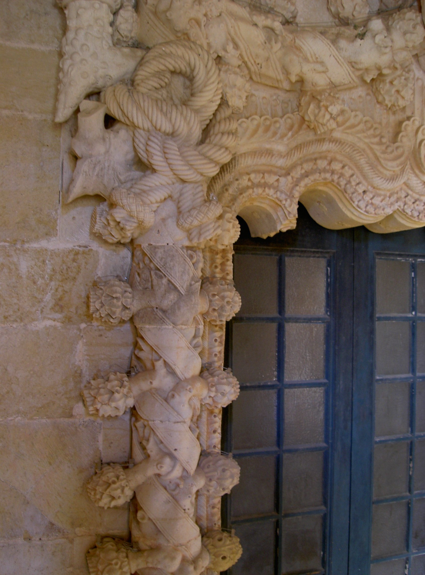 Ecke eines Fensters an einem der zig Kreuzgänge der Kreuzritterburg von Tomar, Portugal, besonderes Augenmerk auf verschlungenes Tau (Manuelinik: Typisch manuelinische Seefahrersymbolik in Tomar)